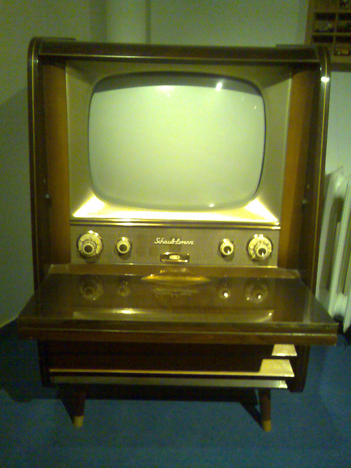 Fernsehempfänger Illustraphon 743